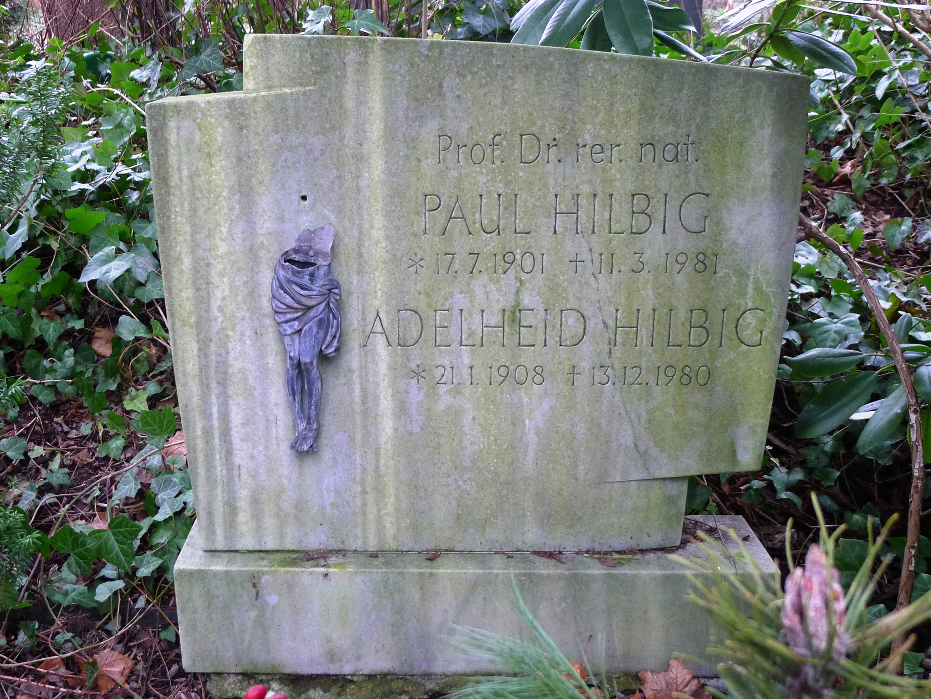 Grabstein von Paul Hilbig und seiner Ehefrau